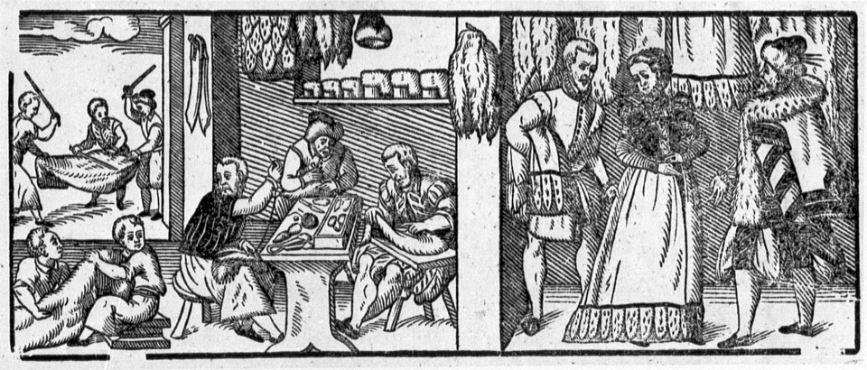 Kürschnerwerkstatt, aus einer Serie mit Darstellung verschiedener Handwerke, Deutschland, um 1550 Germanisches Nationalmuseum Nürnberg, HB 13445, Kapsel 1225